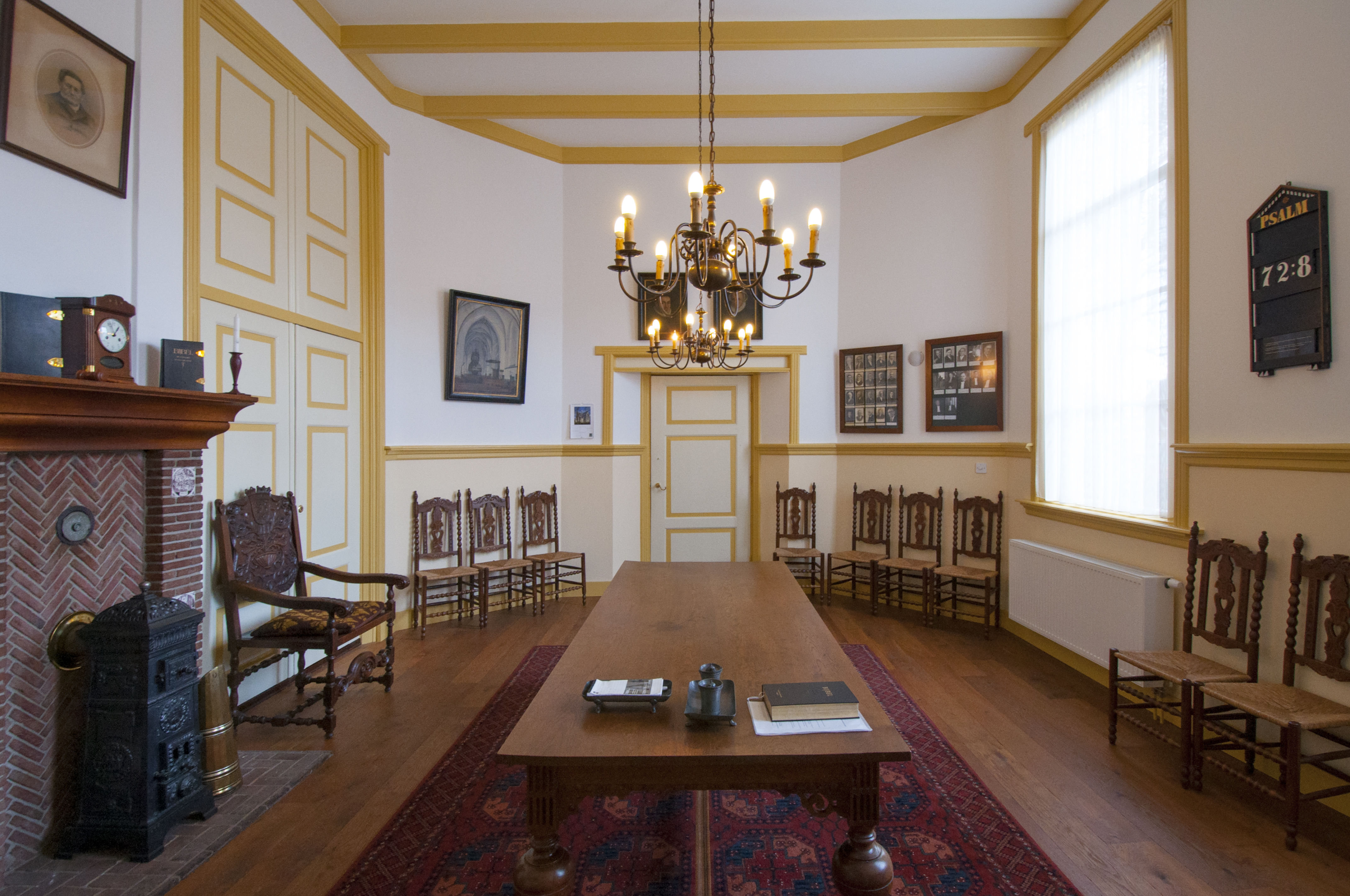 Interieur van de consistoriekamer van de Grote Kerk te Nijkerk, na de renovatie van 2011.